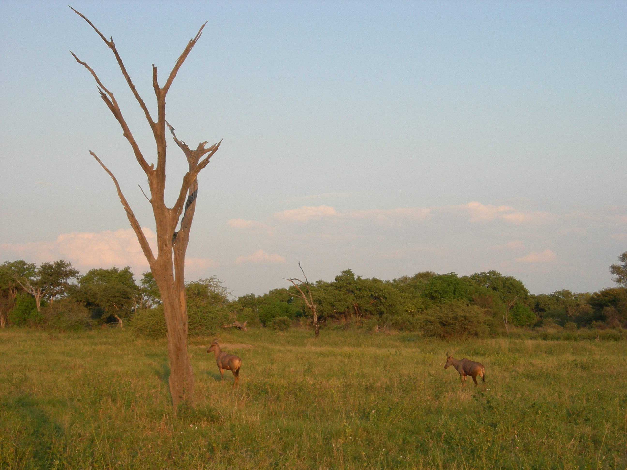 Okavango Delta, Botswana